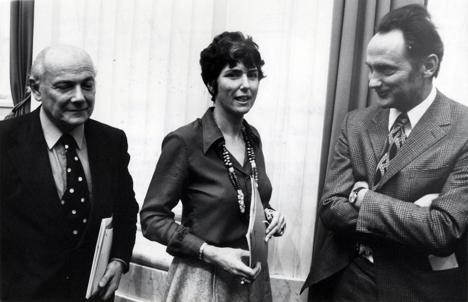 Barendregt, N.G. (PvdA). Mevrouw Barendregt (PvdA), vlak nadat de Tweede Kamer in meerderheid vóór haar motie over de gastarbeiders heeft gestemd. Links: minister-president Den Uyl, -rechts: minister Boersma.